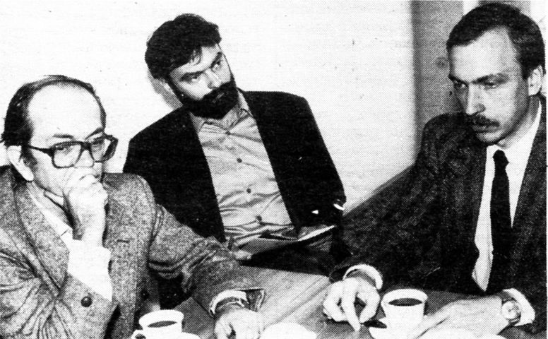 Włodzimierz Suleja (z lewej), Paweł Kocięba (w środku) i Bogdan Zdrojewski podczas spotkania w redakcji "Dziennika Dolnośląskiego